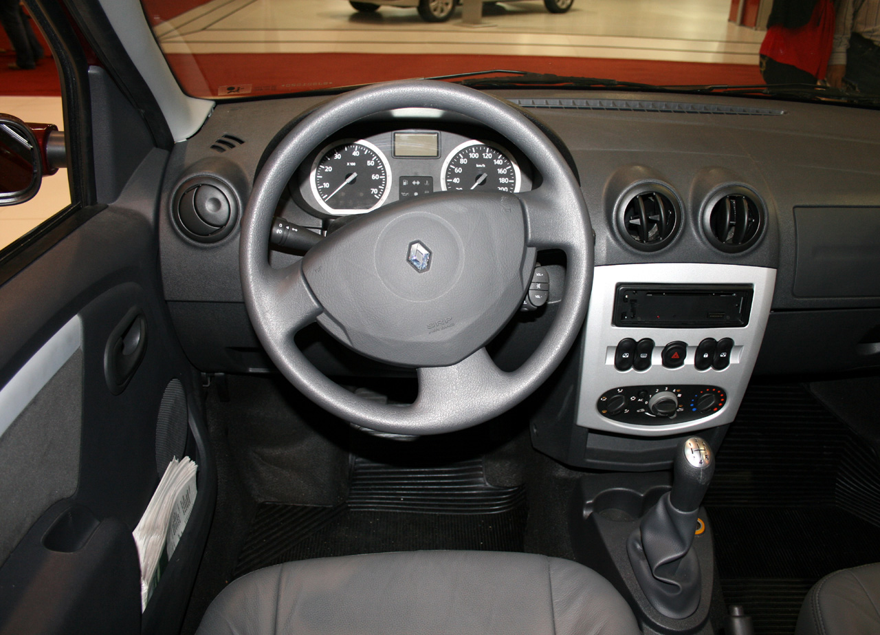 Renault Logan, made in São José dos Pinhais-PR, Brazil.